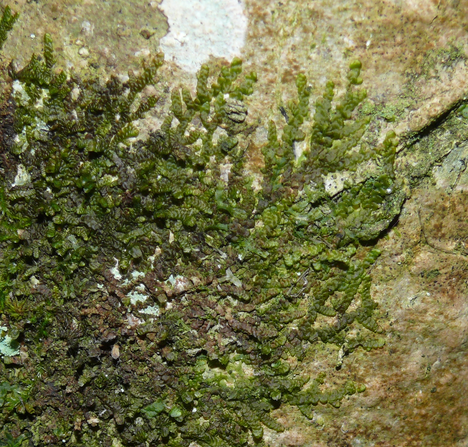 Frullania dilatata, Hohenlohe, Germany